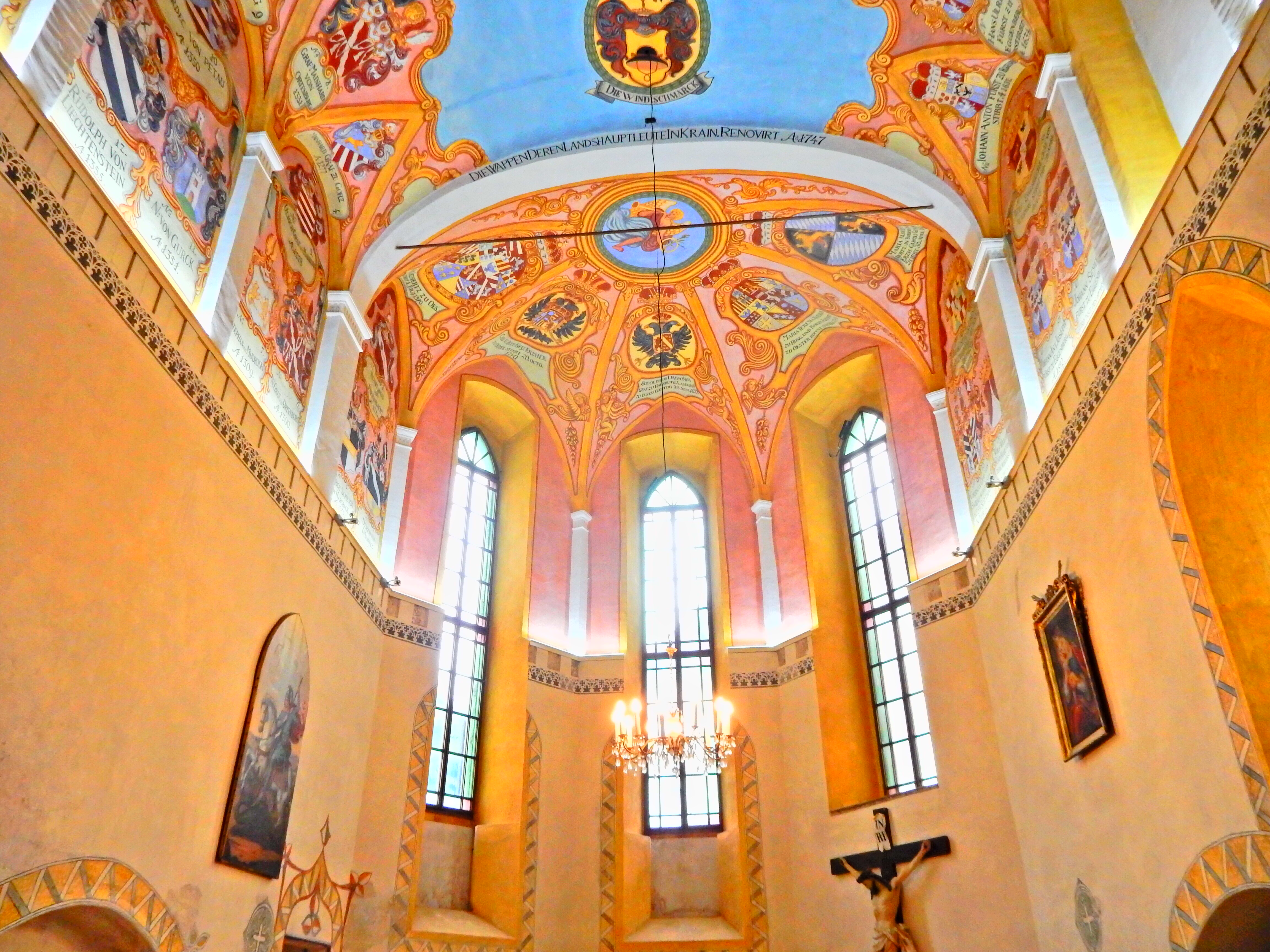 Ljubljana Old Town, Slovenia (Old Camera)